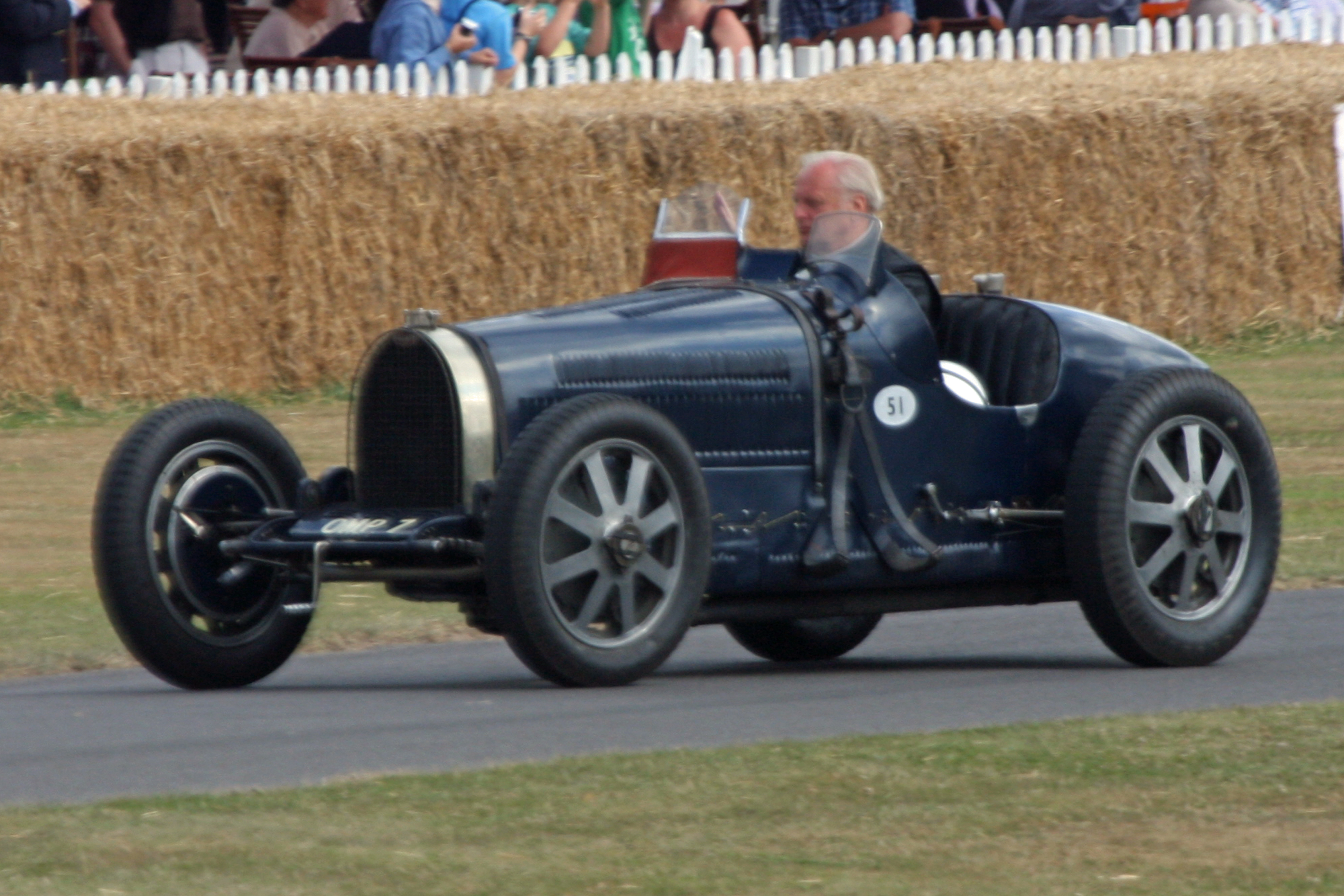 Goodwood 2009